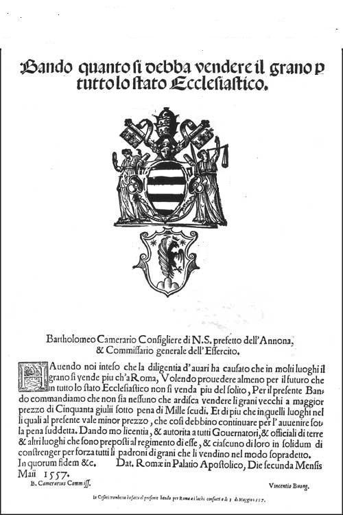 Prezzo massimo di vendita del grano nello Stato Pontificio nel 1557 tratto da Rivista I tempi della terra